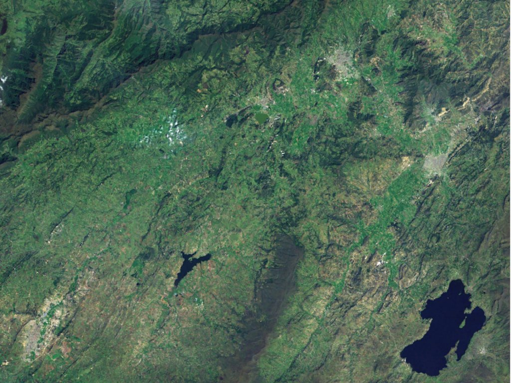 Vista satelital del Alto Chicamocha